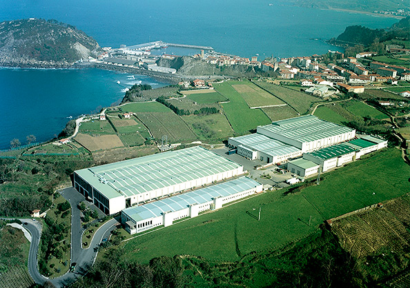 Sede social de Indaux en Getaria, Gipuzkoa, España